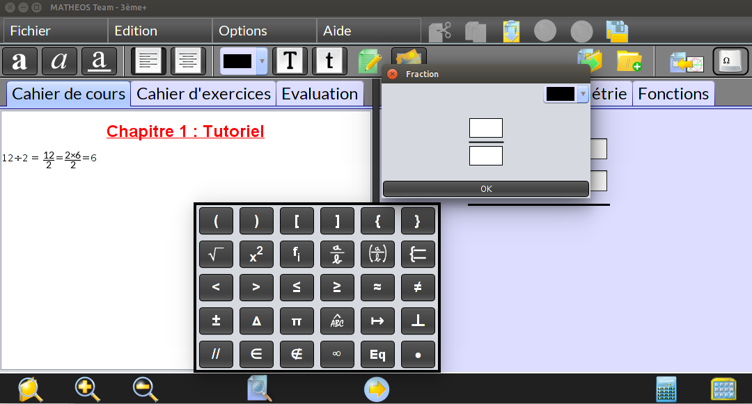 Présentation de l'insertion de formules mathématiques dans MathEOS